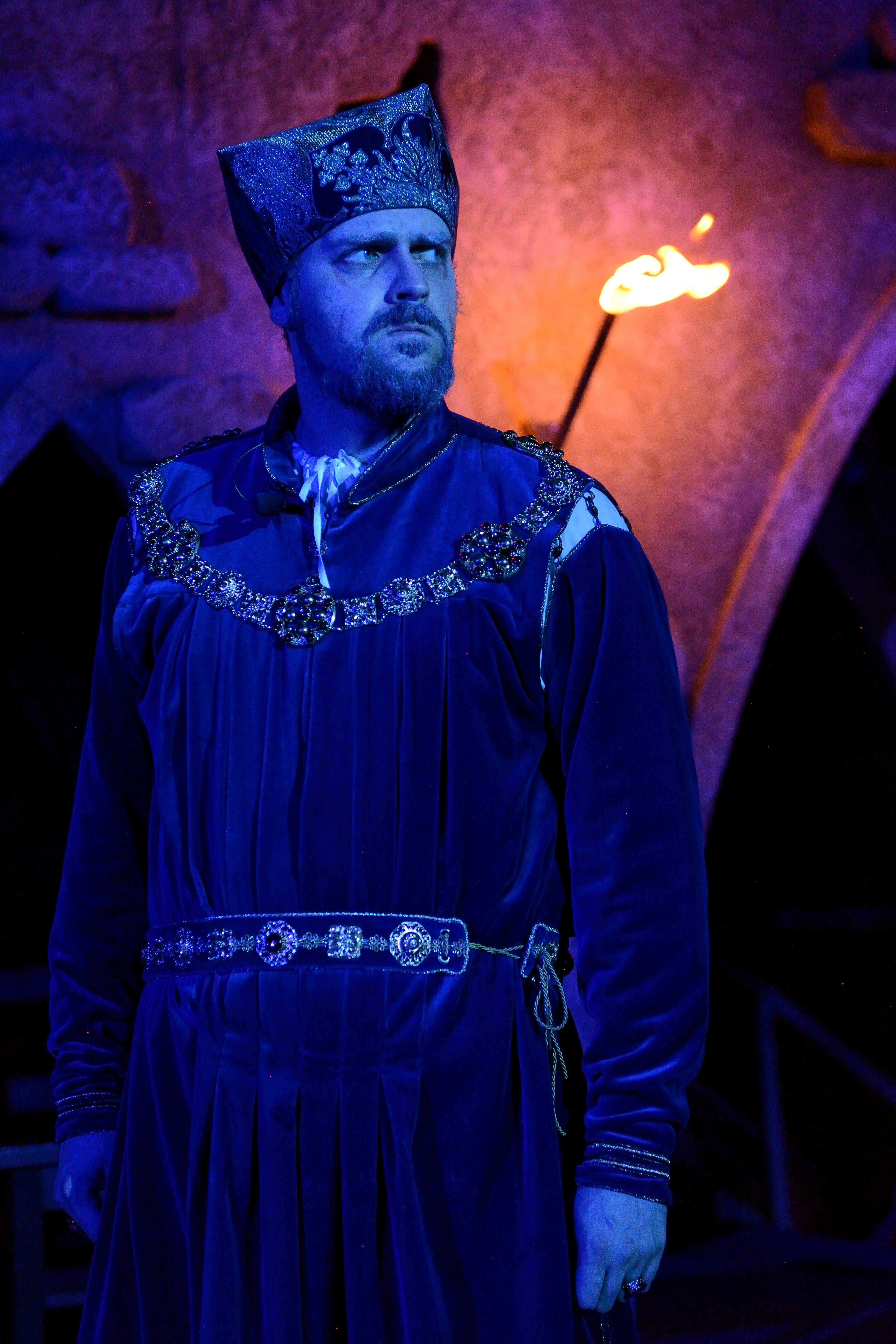 Franz Aichinger als Herzog Ernst bei den Agnes-Bernauer-Festspielen 2019 in Straubing.